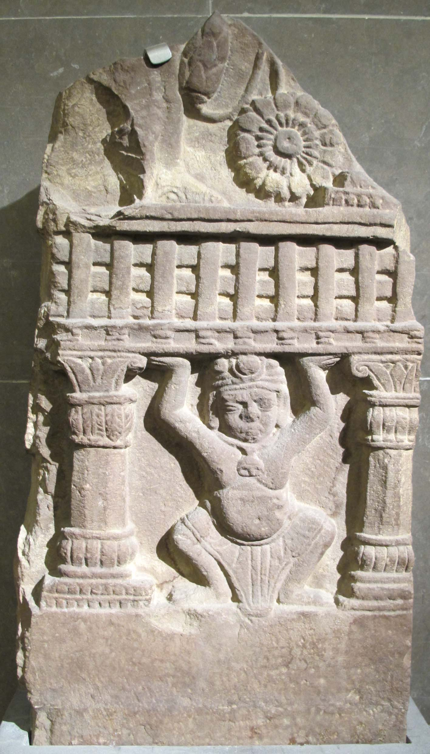 Madhya pradesh, epoca sunga, base di un montante di balaustra ornato con un yaksa-atlante, 200-90 ac. ca